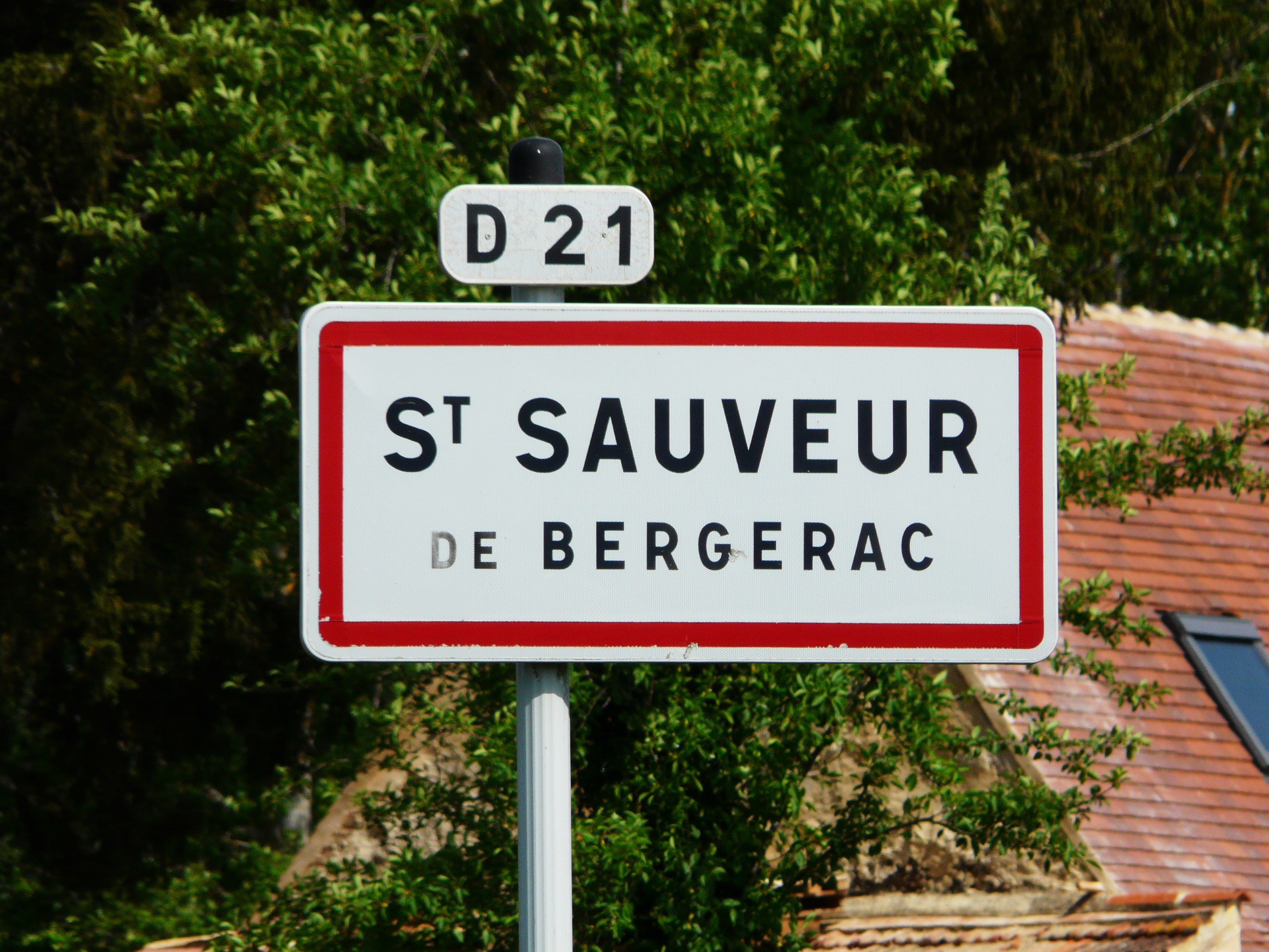 Panneau d'entrée à Saint-Sauveur (commune appelée localement Saint-Sauveur-de-Bergerac), Dordogne, France.